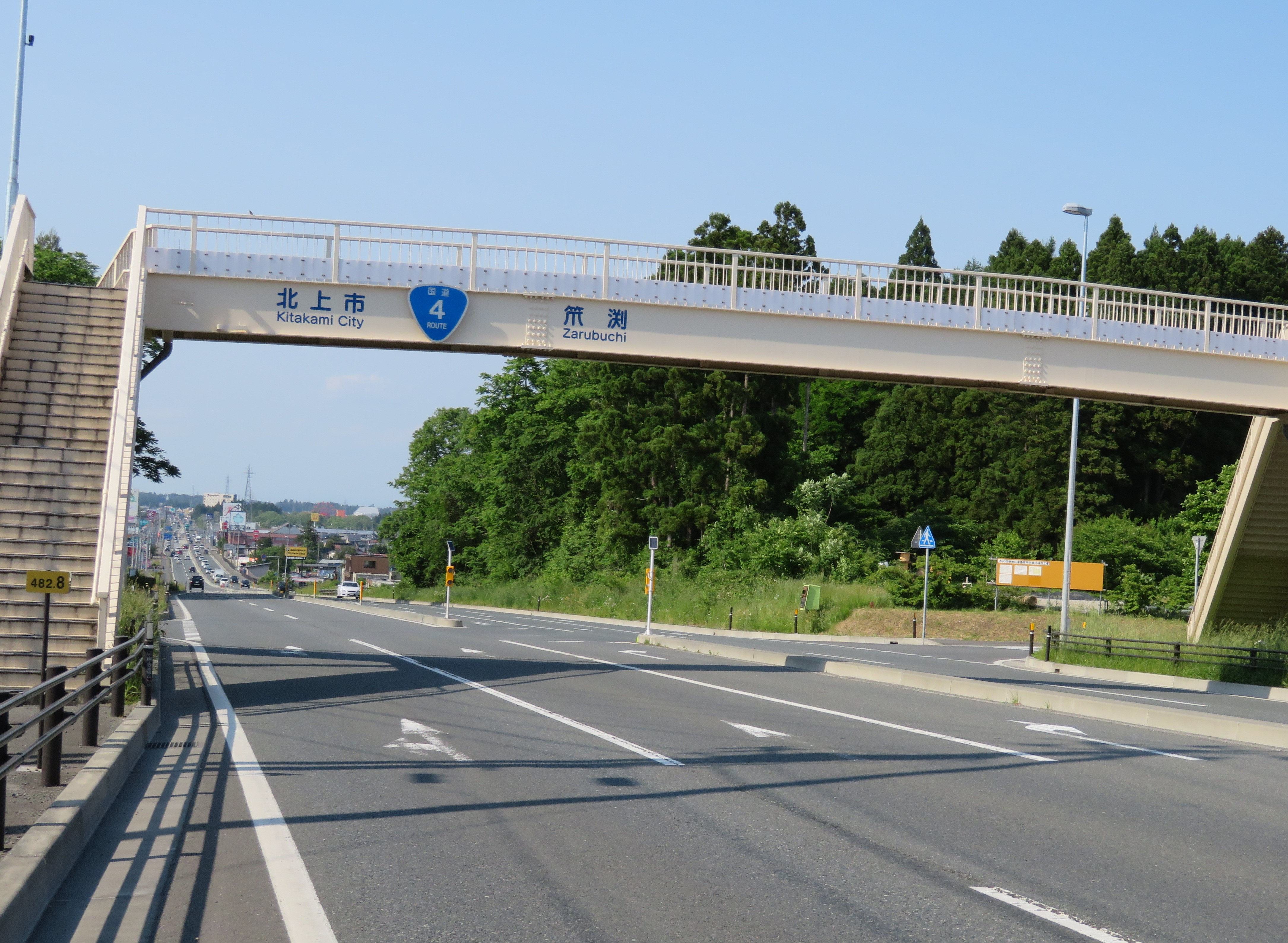 国道4号線北上バイパス北上市笊渕歩道橋付近（盛岡方面を を撮影） Canon PowerShot SX720 HS